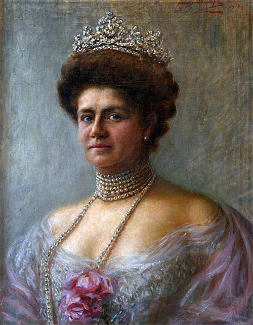 Charlotte zu Schaumburg-Lippe (1864-1946), Königin von Württemberg